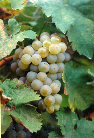 Uvas Muller Thurgau